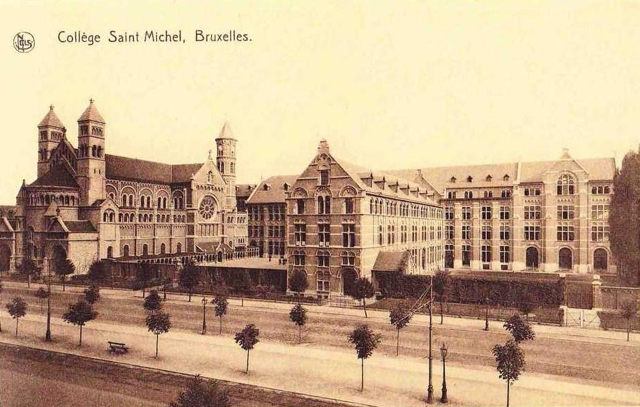 Collège Sait Michel des pères Jésuites à Bruxelles vers 1912. Date fixée d'après la présence de l'église achevée.